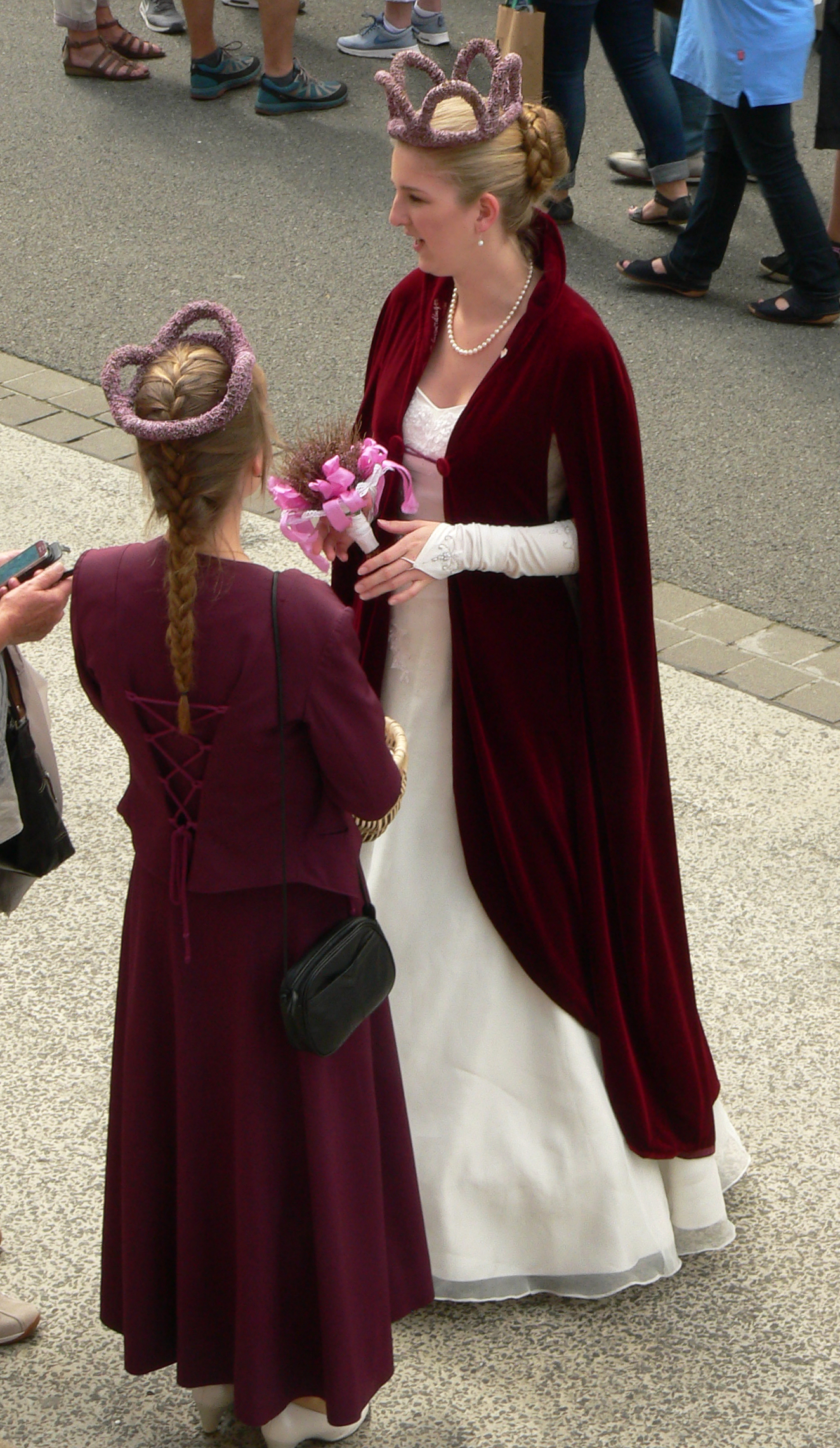 Heidekönigin aus Schneverdingen der Saison 2016 und 2017